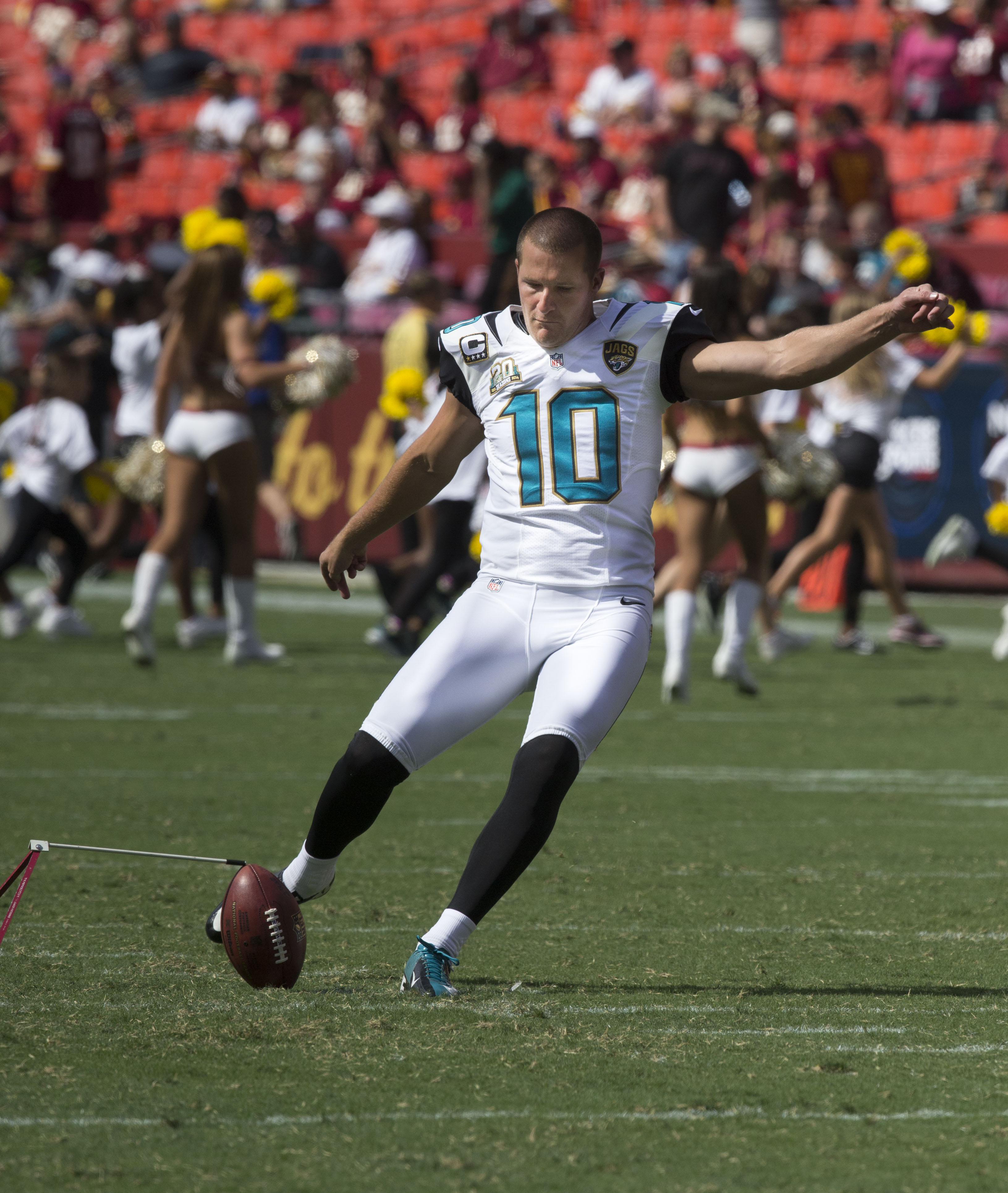 Jaguars at Redskins 9/14/14